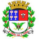 Brasão da cidade de Nova Aliança, SP